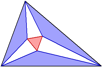 Illustratie van de Stelling van Morley (eigen illustratie)